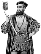 Martim Afonso de Souza